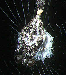 female Cyclosa confusa from Okinawa.